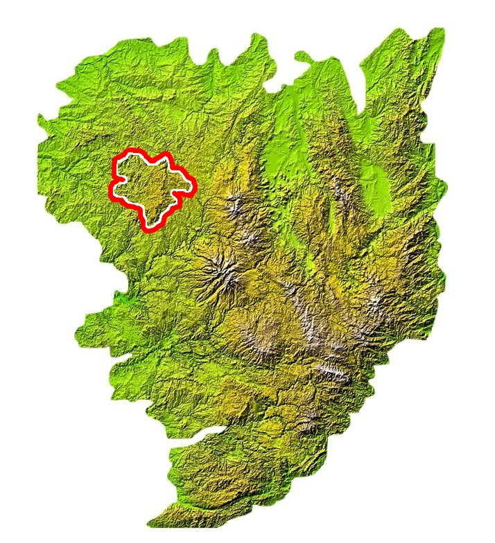 Situation du plateau de Millevaches sur la carte du Masif central